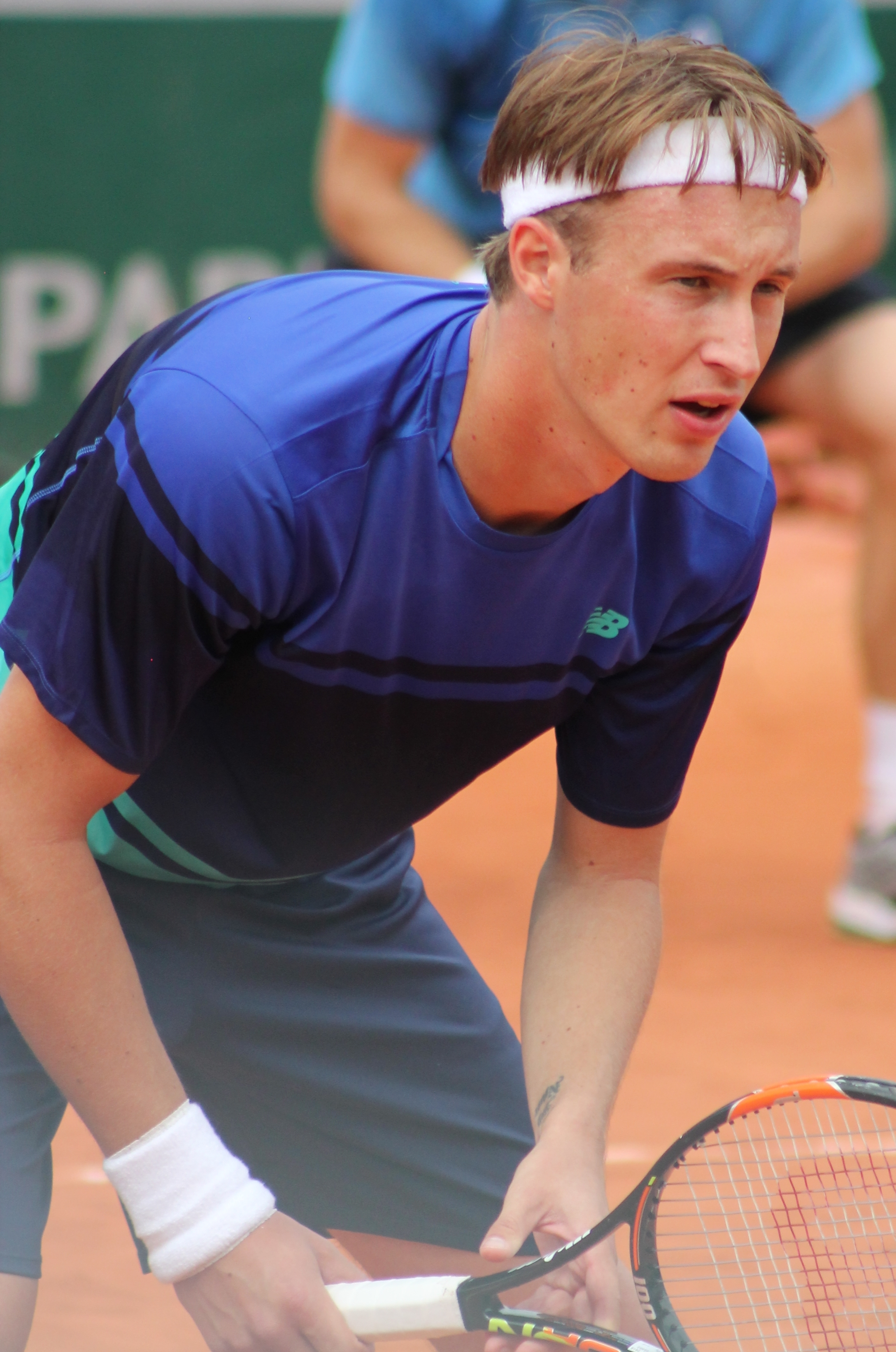 Kontinen RG16 (13)